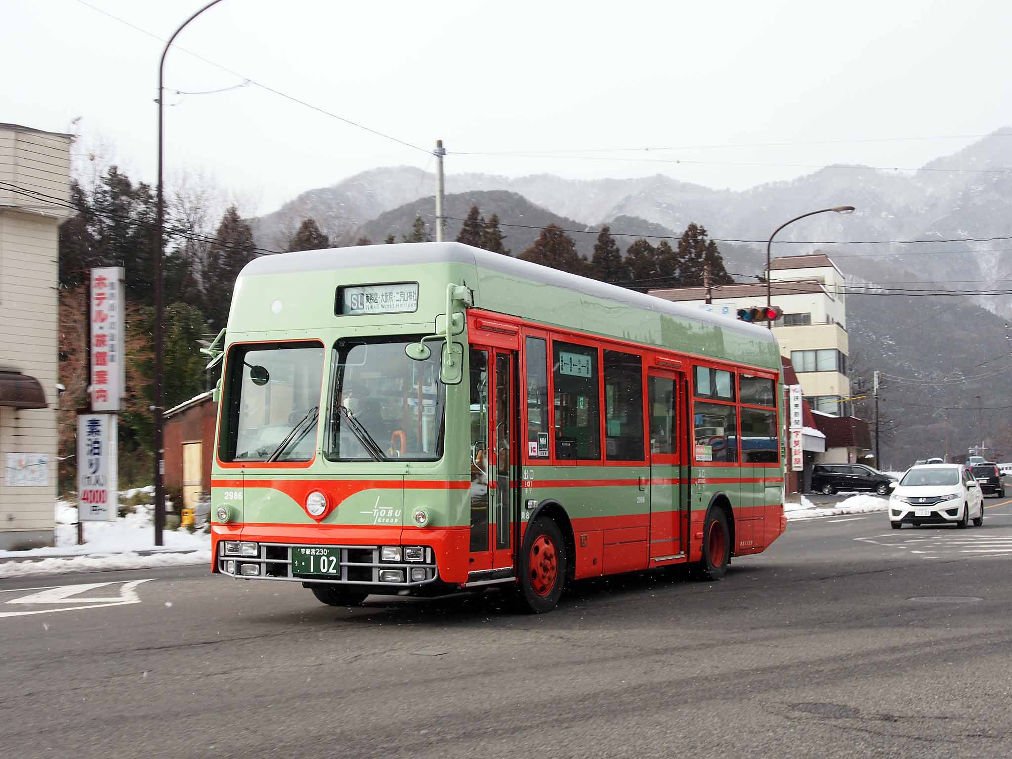 2017年に導入された東武バス日光の日光軌道線タイプ特別車両。主に東武鬼怒川線のSL大樹運転日に鬼怒川温泉駅 - 東武日光駅・東照宮などの世界遺産エリアを結ぶ路線に就役する。 型式：いすゞ・エルガミオ LR290J2 架装：岩戸工業 登録番号：宇都宮230う・102